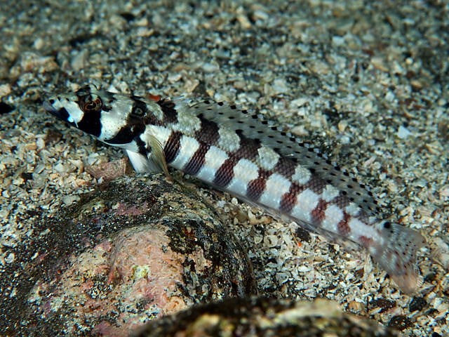 マダラトラギス Parapercis tetracantha